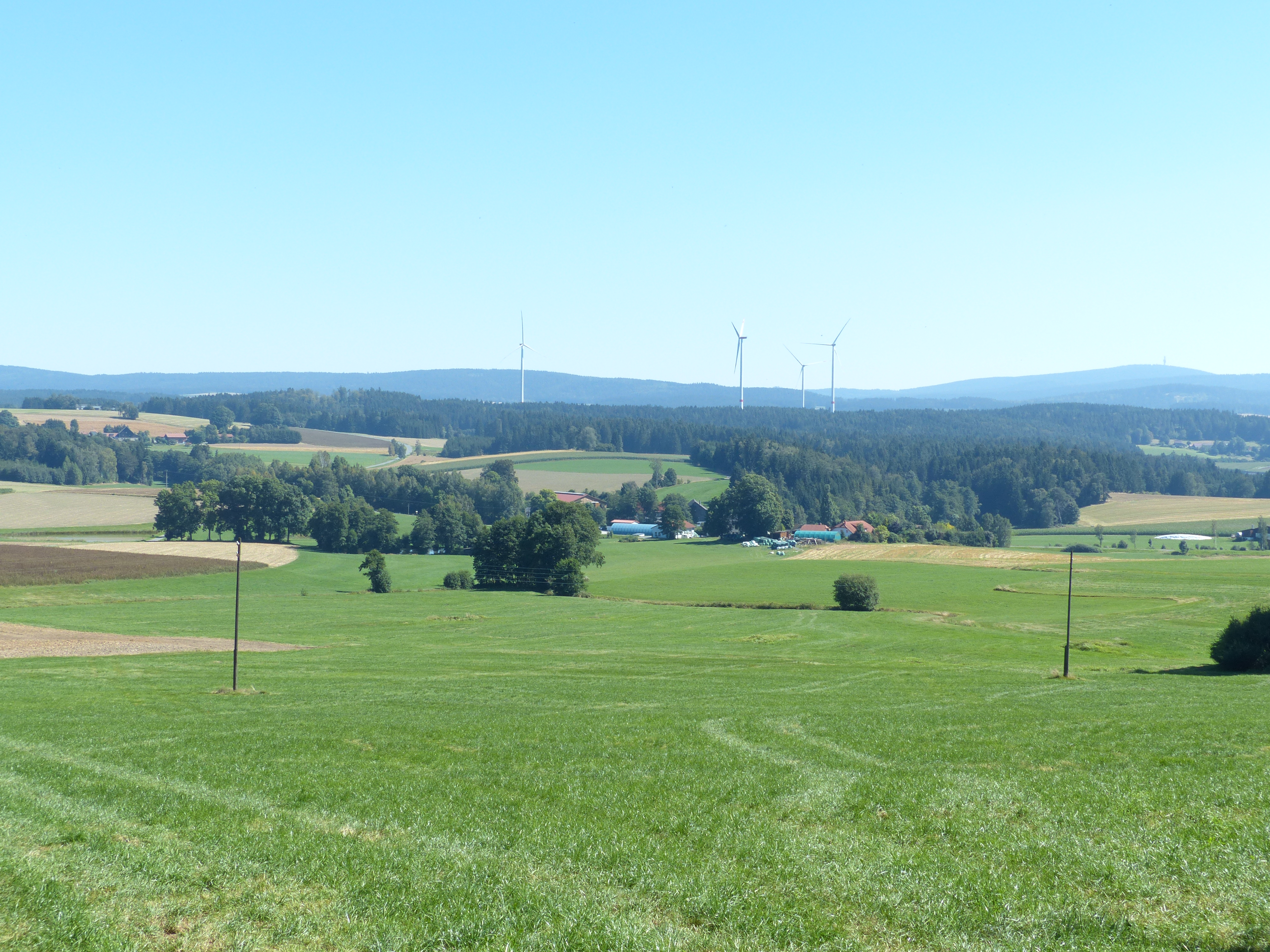 Ortsansicht von Tennersreuth